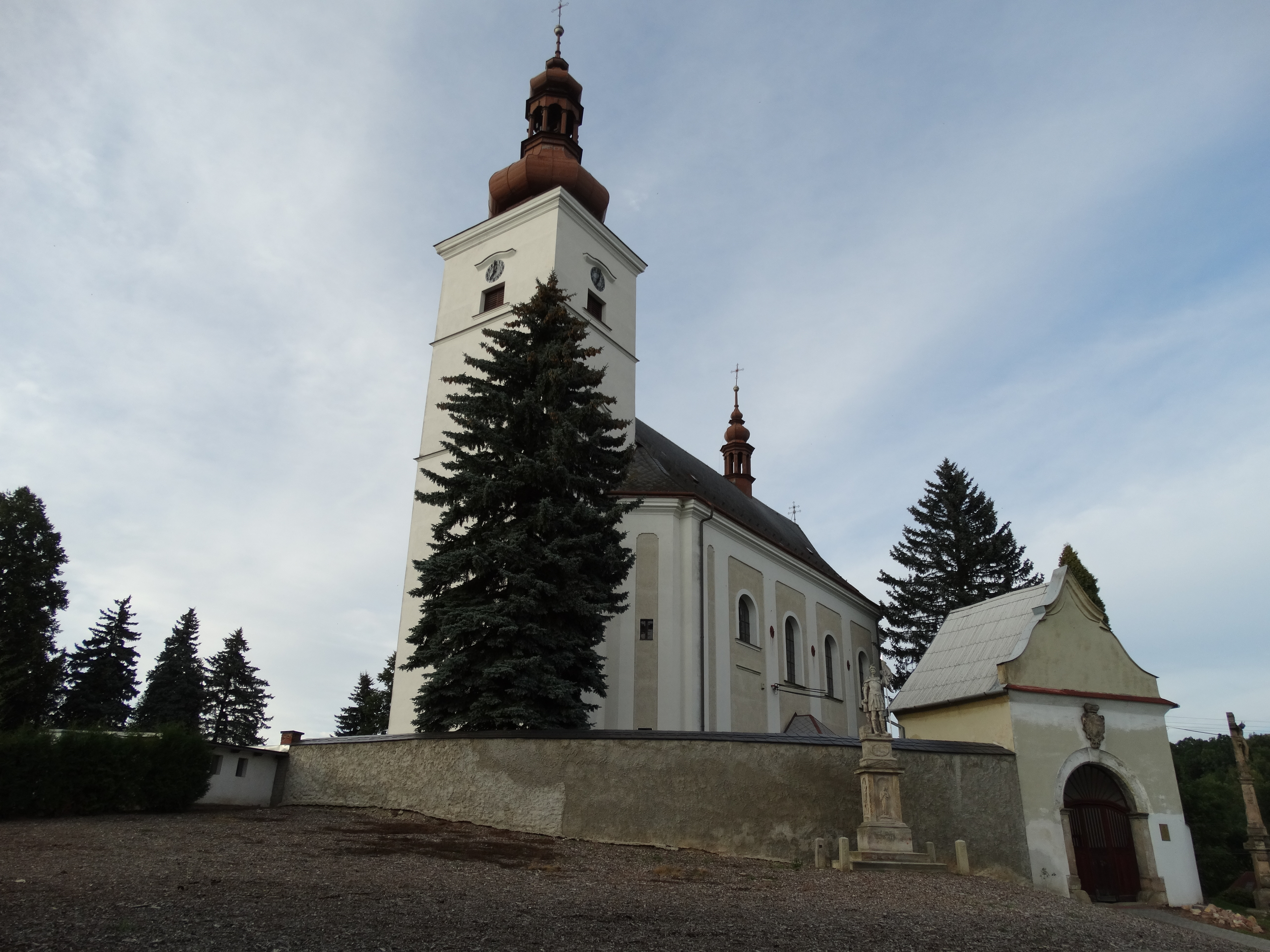 kostel v Rychnově na Moravě